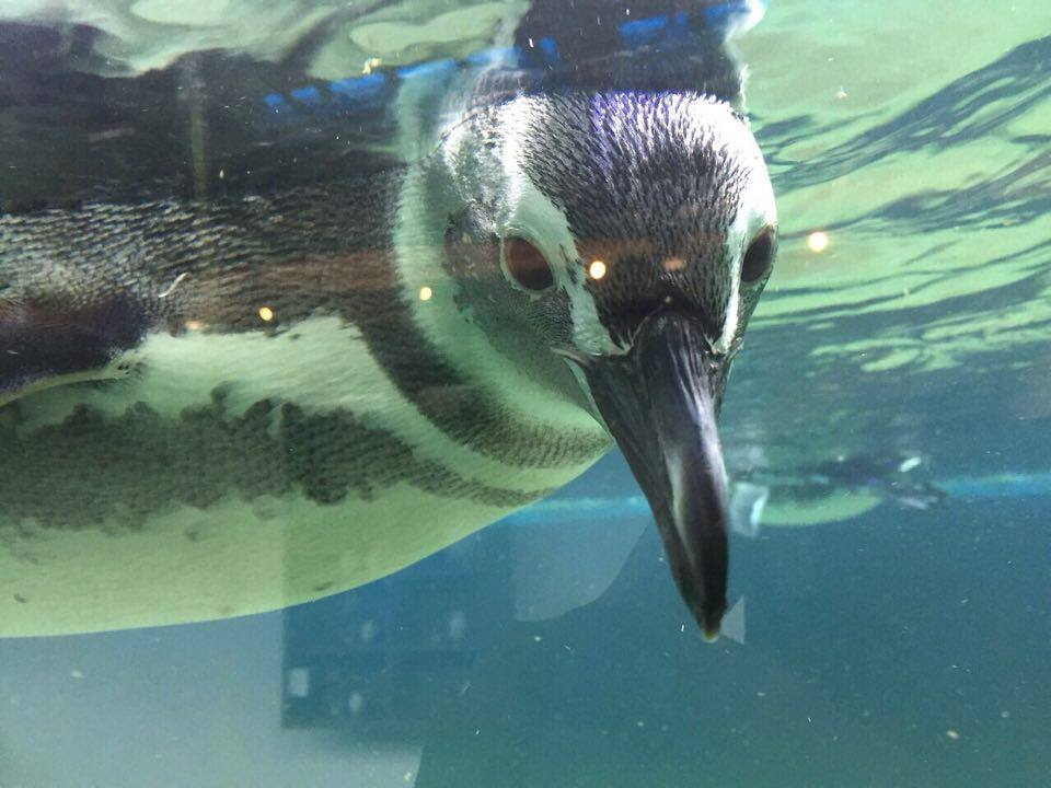 Pinguim que fica no pinguinário da instituição